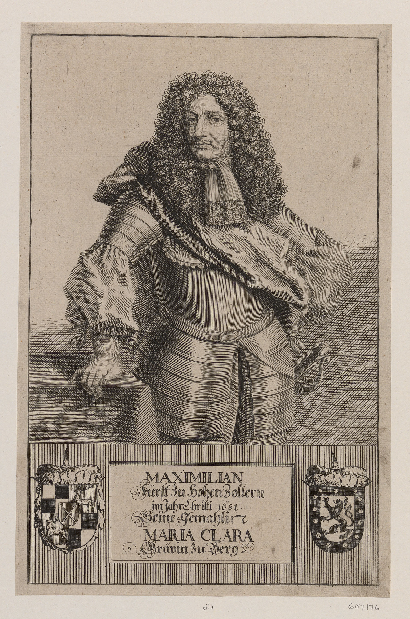 Maximilien I de Hohenzollern-Sigmaringen